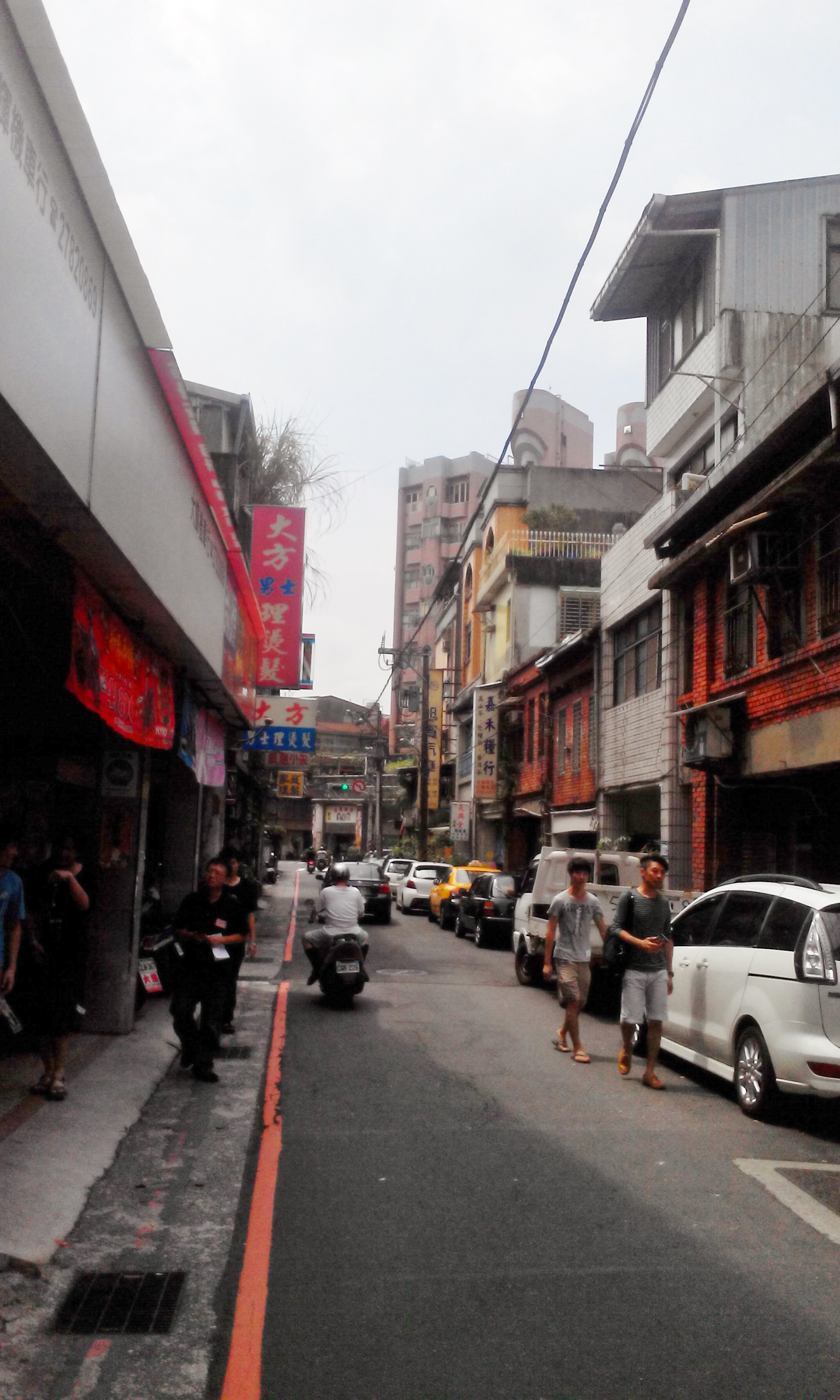 20140816-wikimambo Zhong-nan St. Nan-gang Dist. Taipei